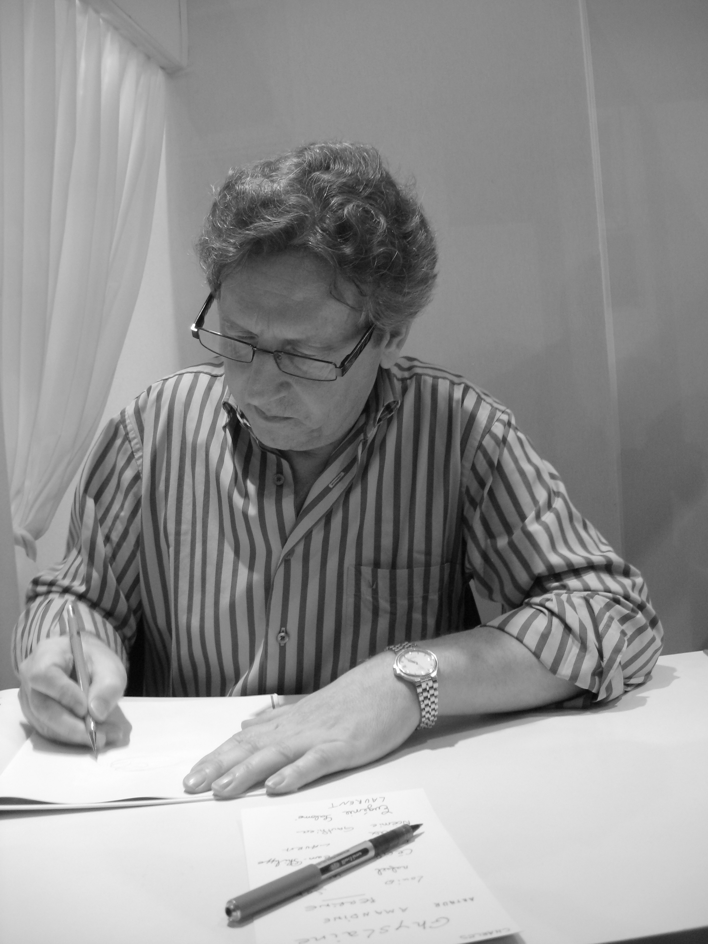 Jeroen De Coninck, illustrateur belge